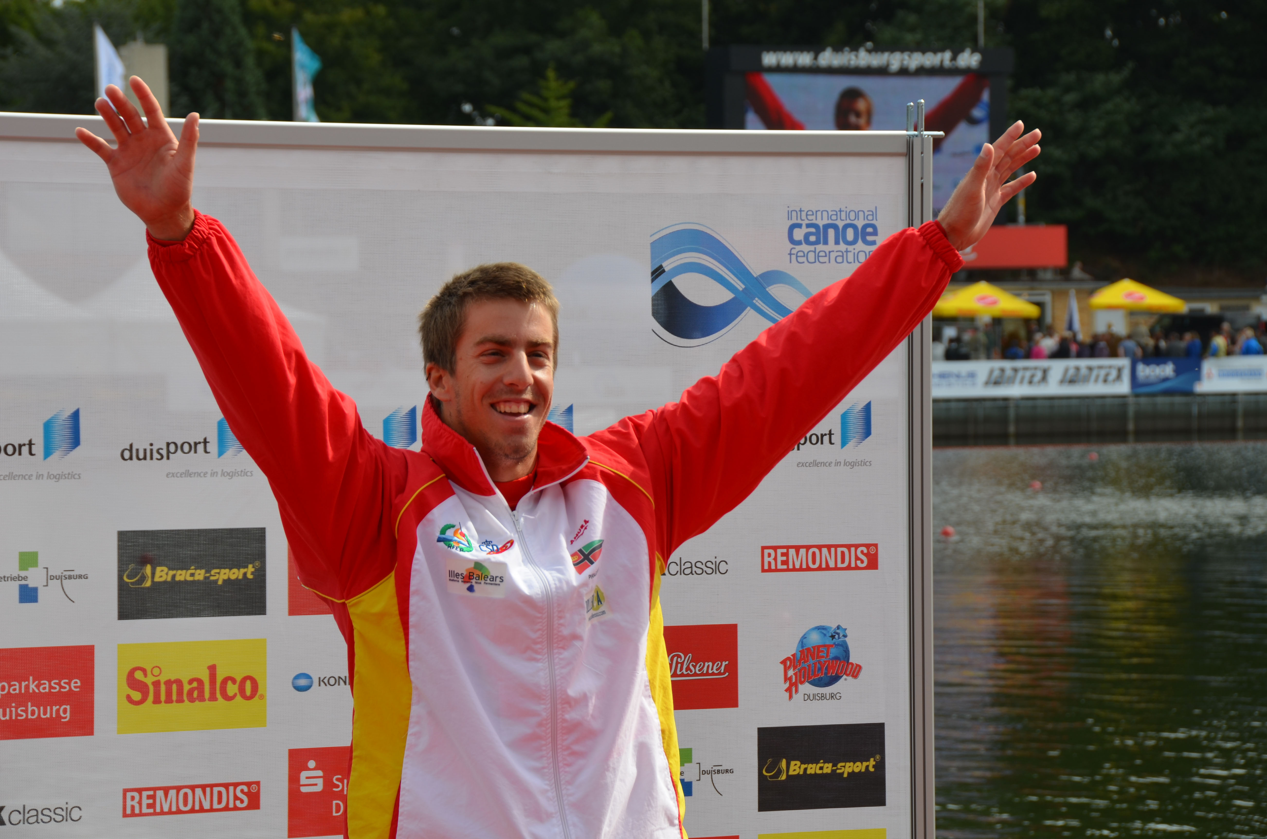 2013 ICF Canoe Sprint World Championships in Duisburg - Alle Ergebnisse/Teilnehmer unter: Gewinner: AZE - AZERBAIJAN DEMYANENKO, Valentin RUS - RUSSIA SHTYL, Ivan ESP - SPAIN BENAVIDES LOPEZ DE AYALA, Alfonso